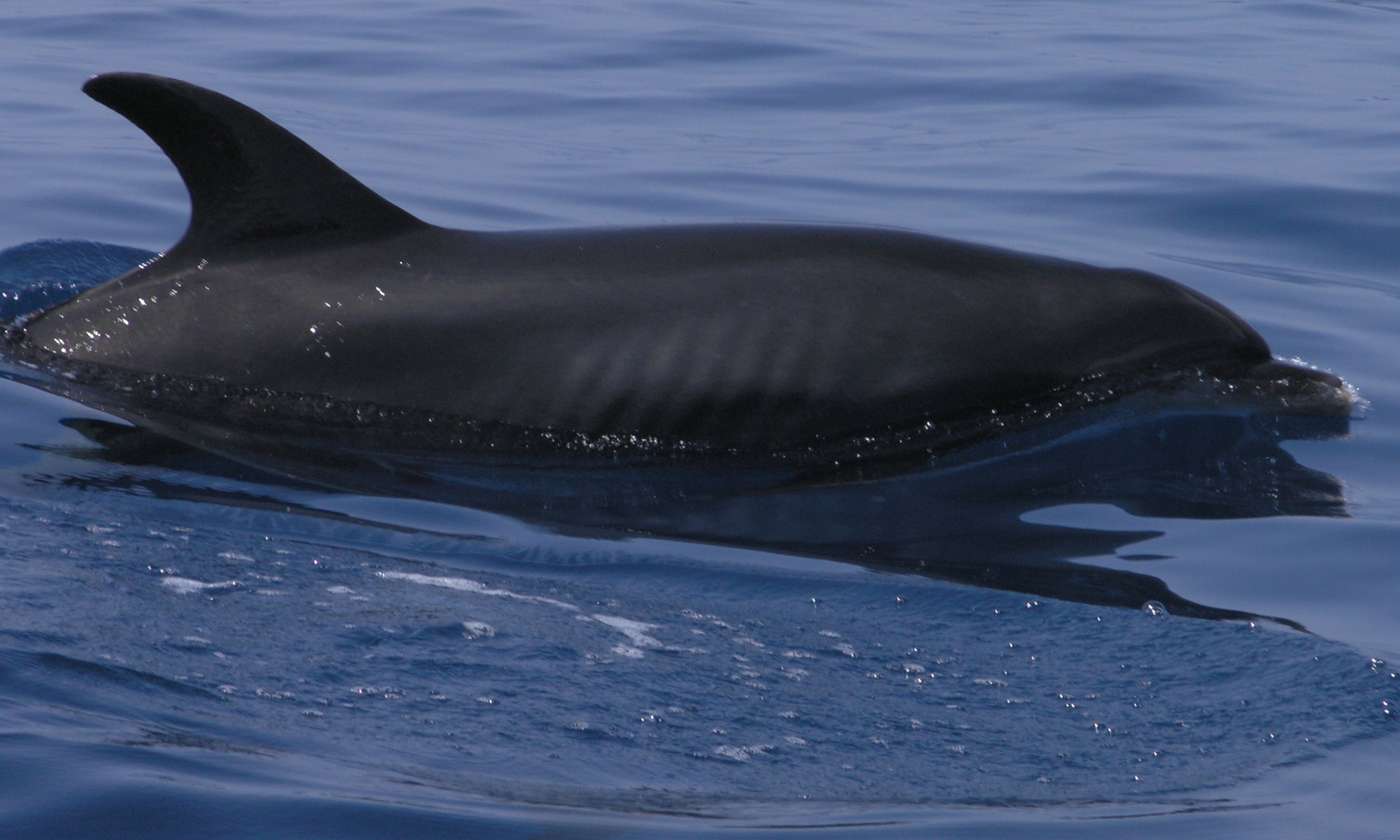 Ein stark abgemagertes Großtümmler-Weibchen (Tursiops truncatus, vor La Gomera).